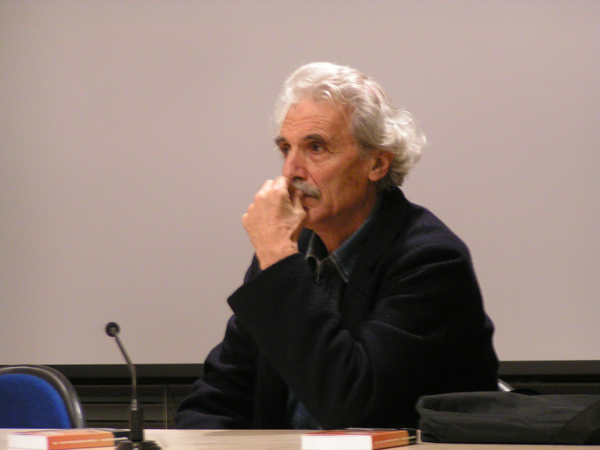 Il regista armeno Yervant Gianikian, che insieme ad Angela Ricci Lucchi ha realizzato il documentario "Oh, uomo!", ultima parte della “trilogia della guerra” proiettata il 2 dicembre nel corso del seminario Redattore Sociale